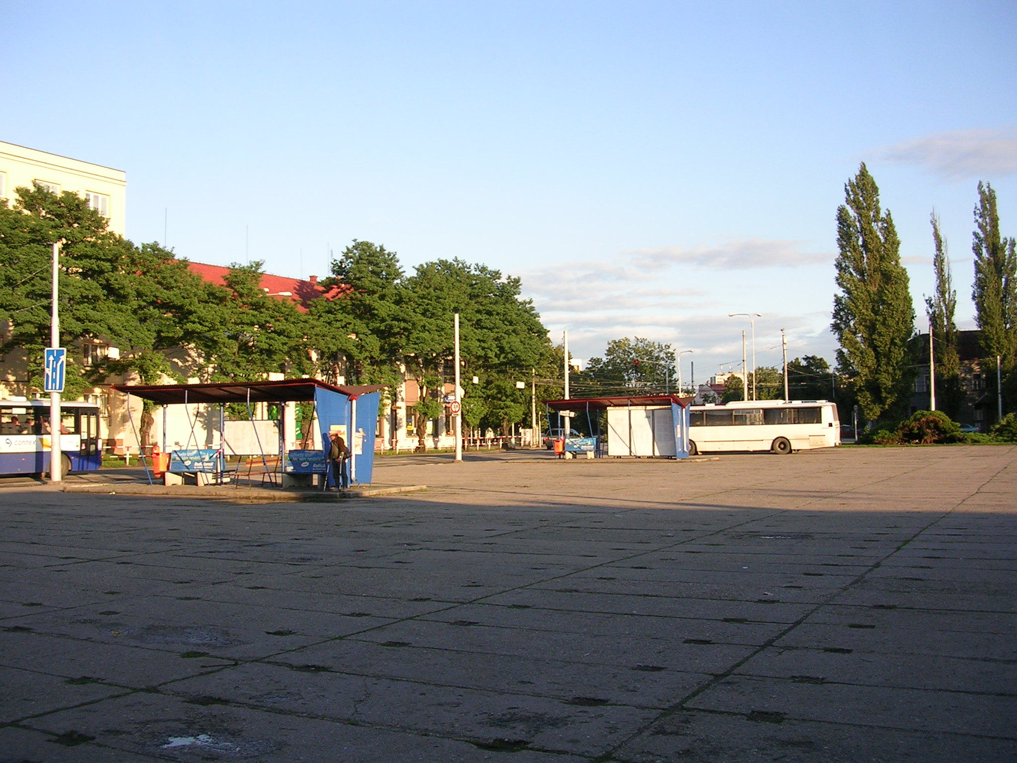 Autobusové stanoviště Koruna v Hradci Králové